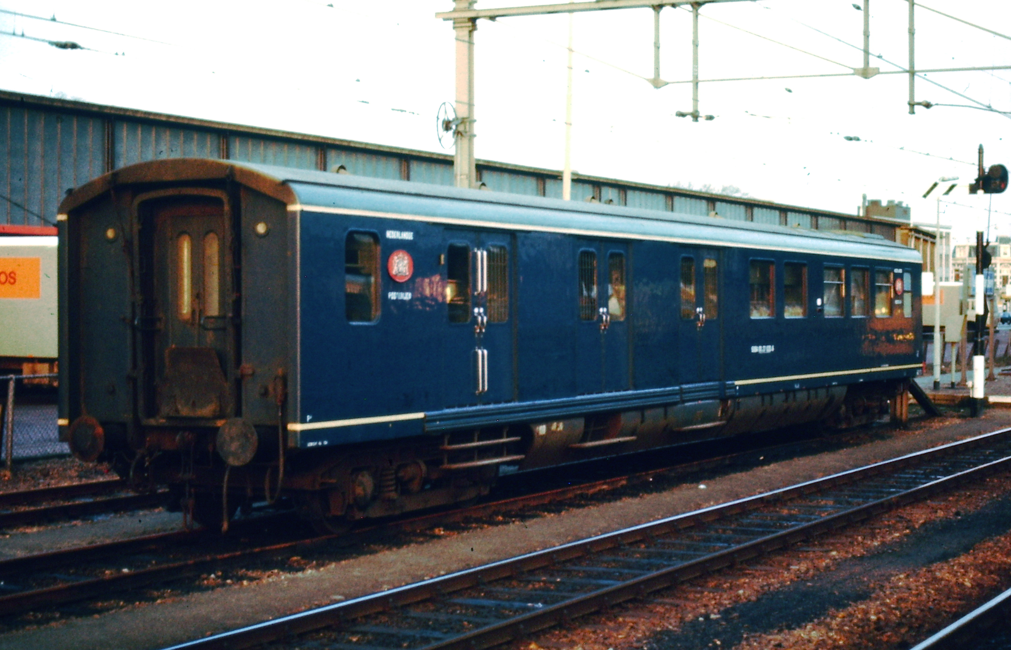 NS postrijtuig van het type Plan E, Nummer: 50 84 00-37 028-6 (P7928) te Leeuwarden. [1]